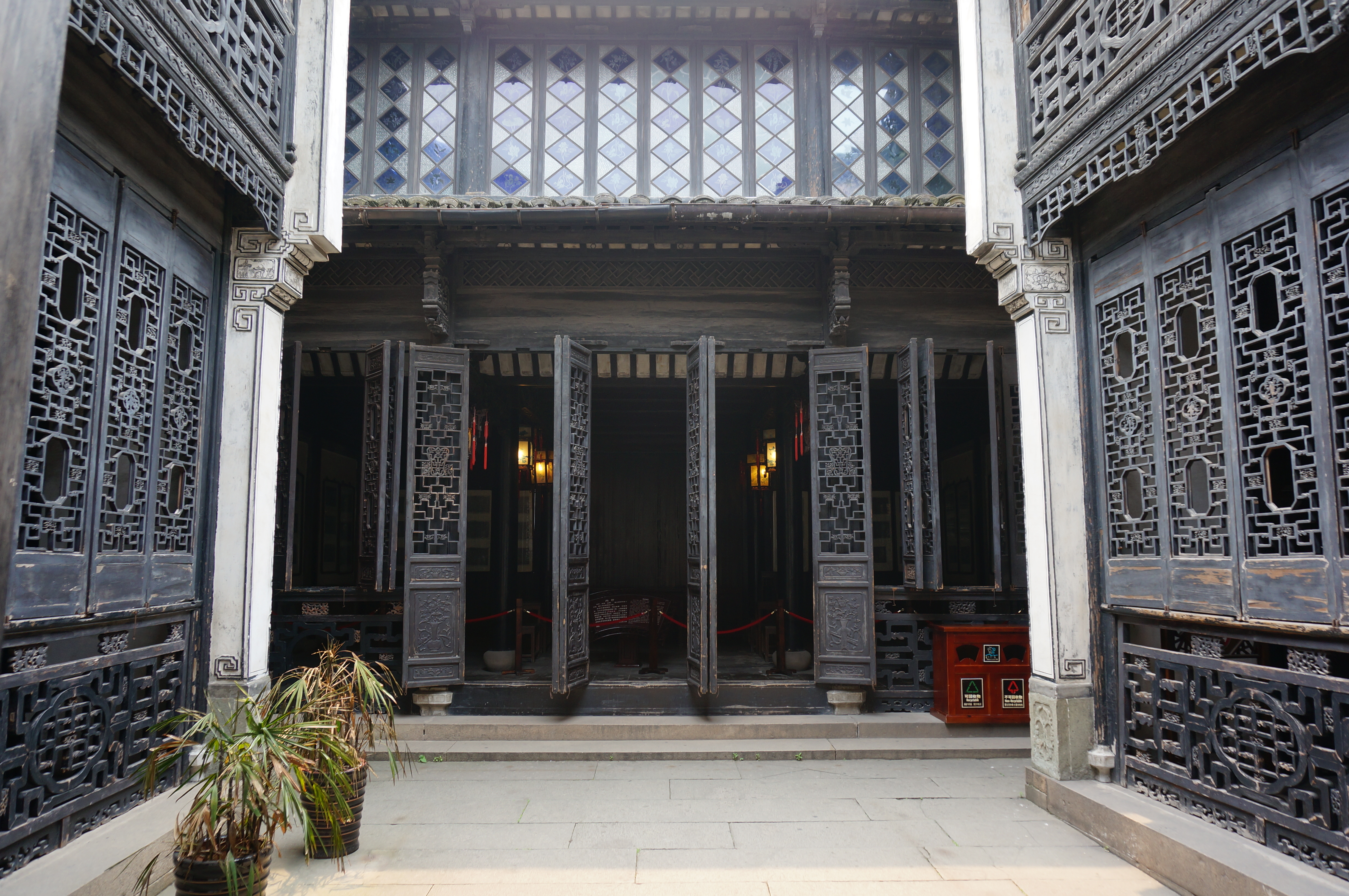 张石铭旧居，第三进内厅（堂楼），东侧（外侧）。